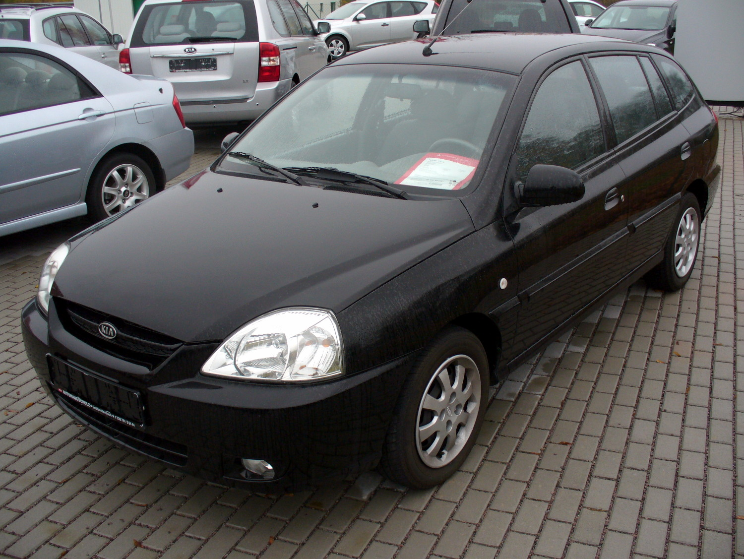 Kia Rio